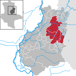 Ehemalige Verwaltungsgemeinschaft Genthin in Sachsen-Anhalt - Landkreis Jerichower Land